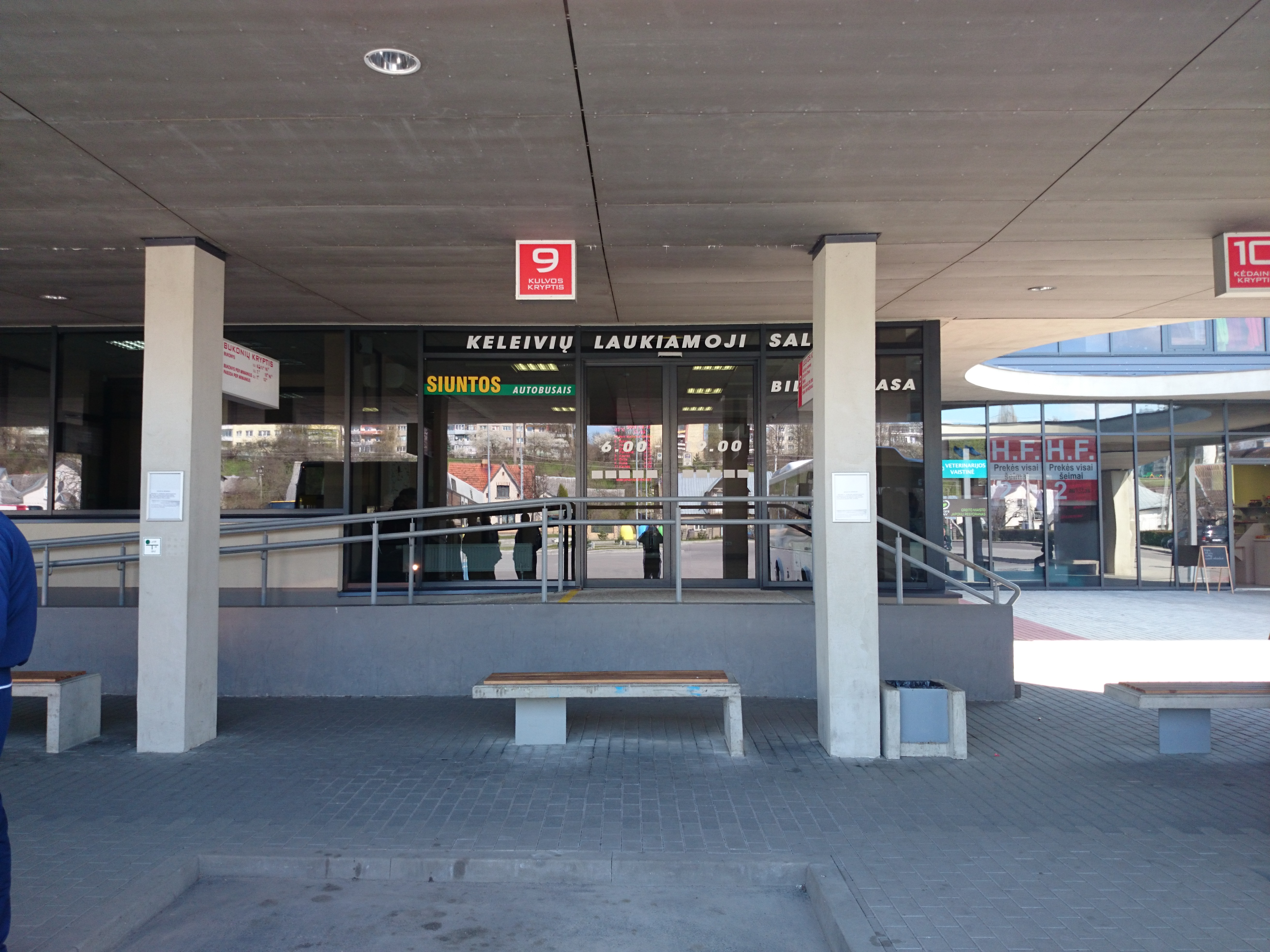 Jonava bus station